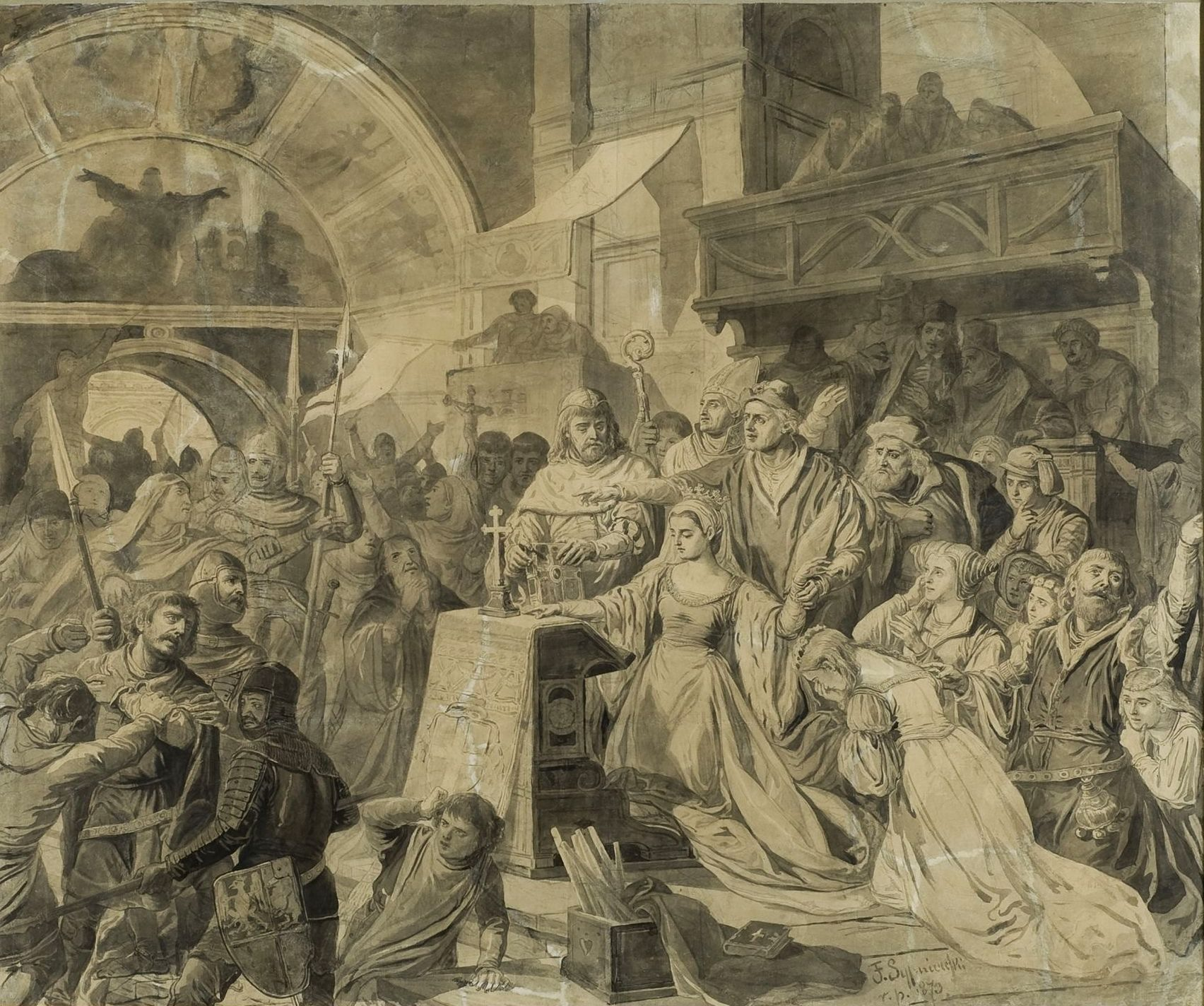 Przysięga królowej Zofii Holszańskiej